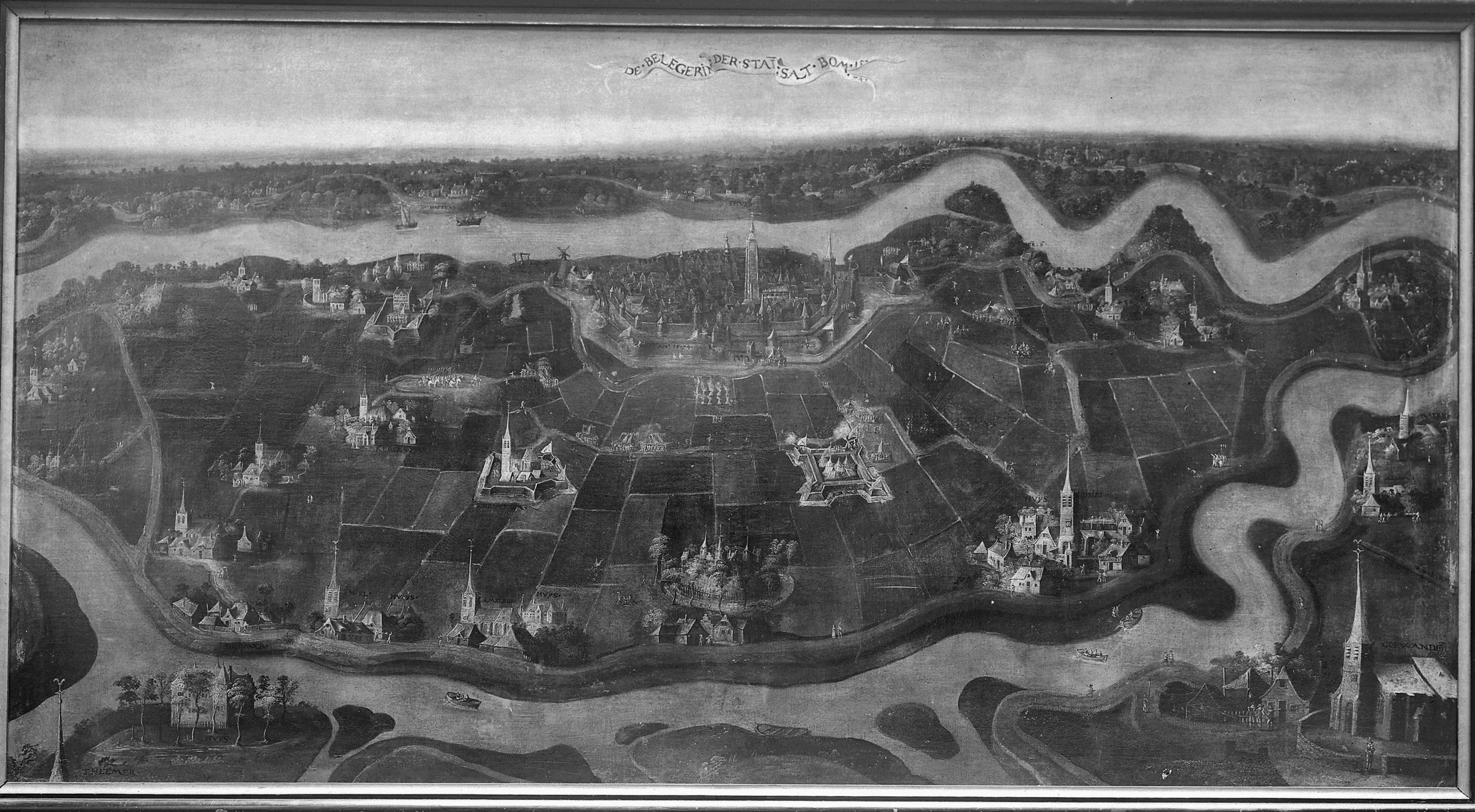 Raadhuis: Schilderij, Beleg in 1574